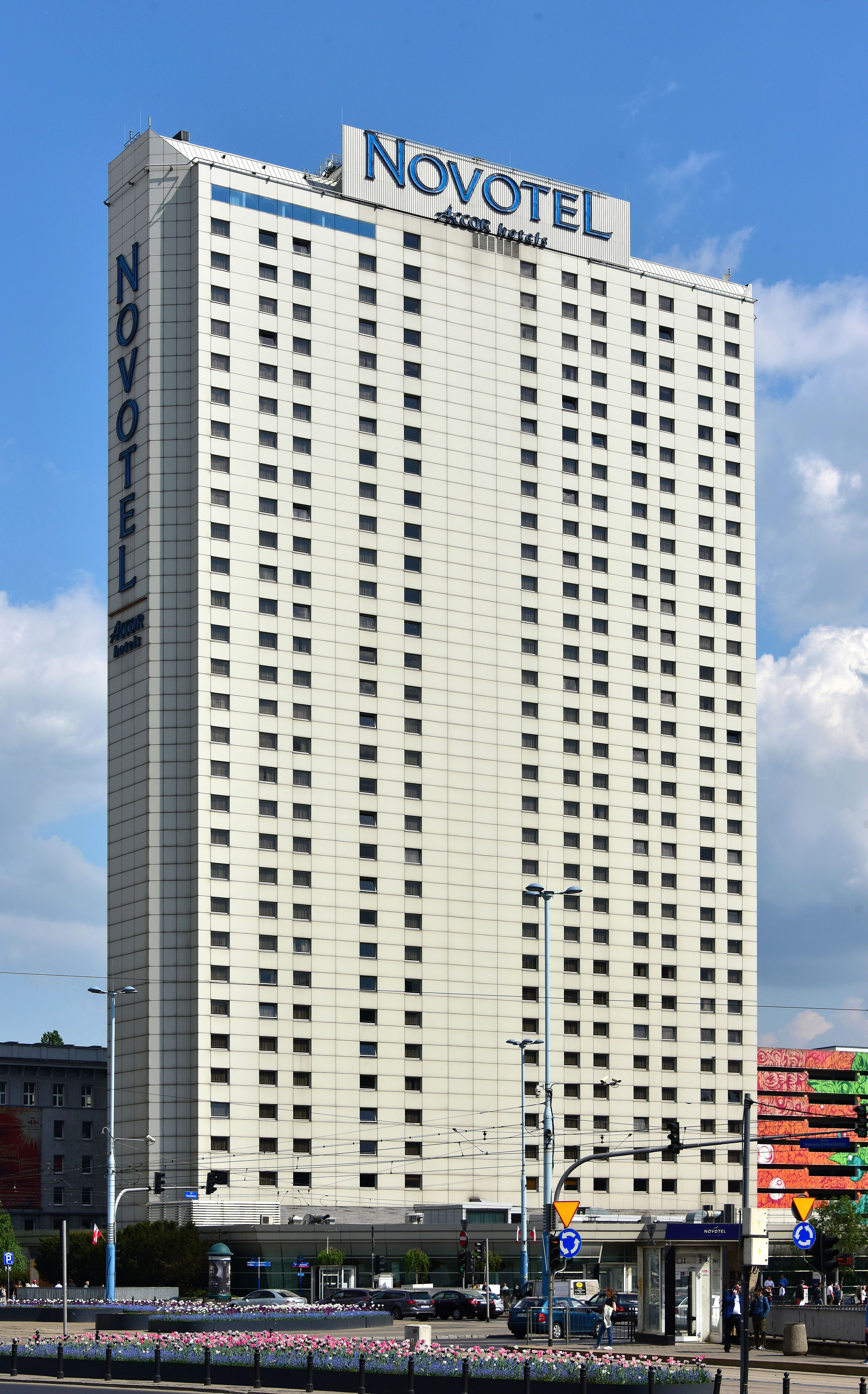 Hotel Novotel Centrum w Warszawie